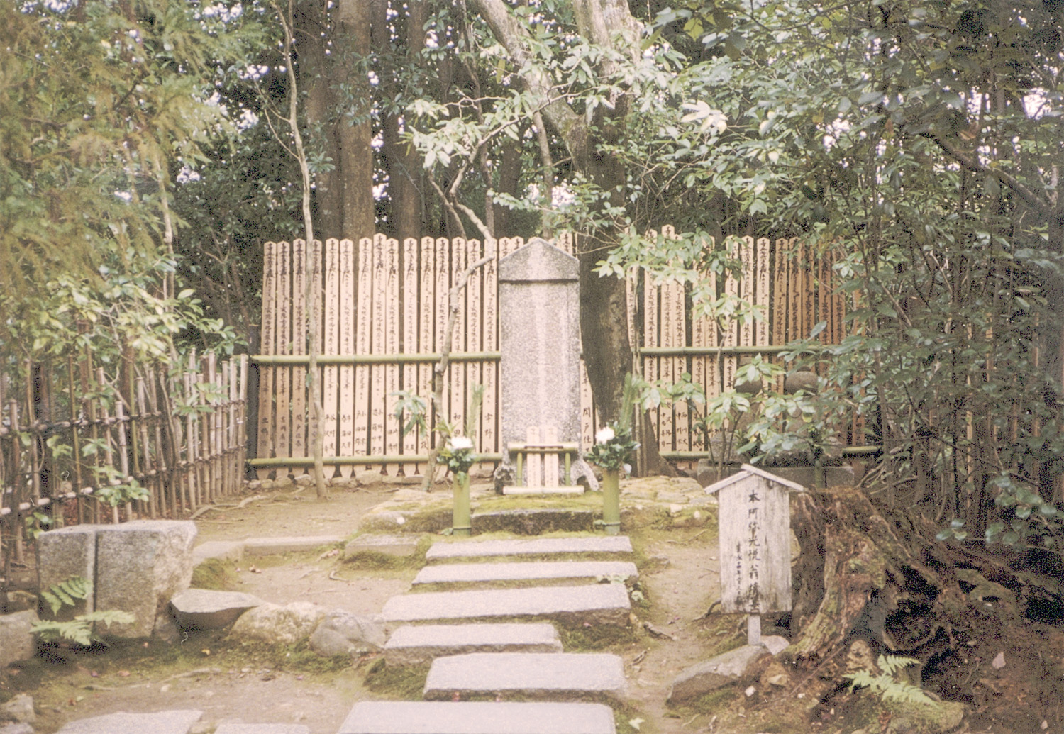 Kōetsu-ji, Kyoto, Japan 光悦寺